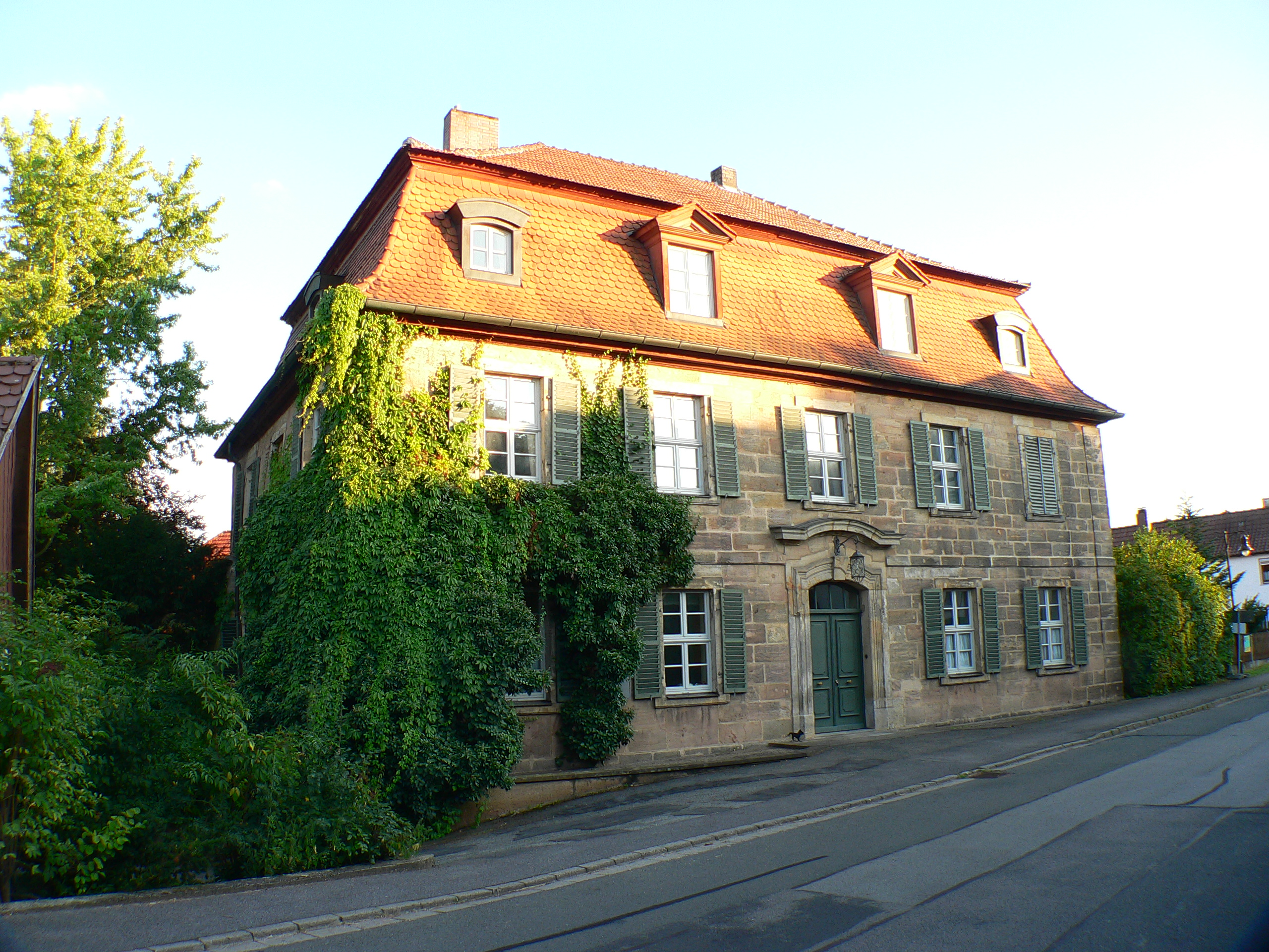 Schloss Scherneck in Untersiemau-Scherneck, Kreis Coburg, Bayern